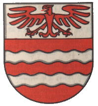 Wappen von Cugy Kanton Waadt Schweiz